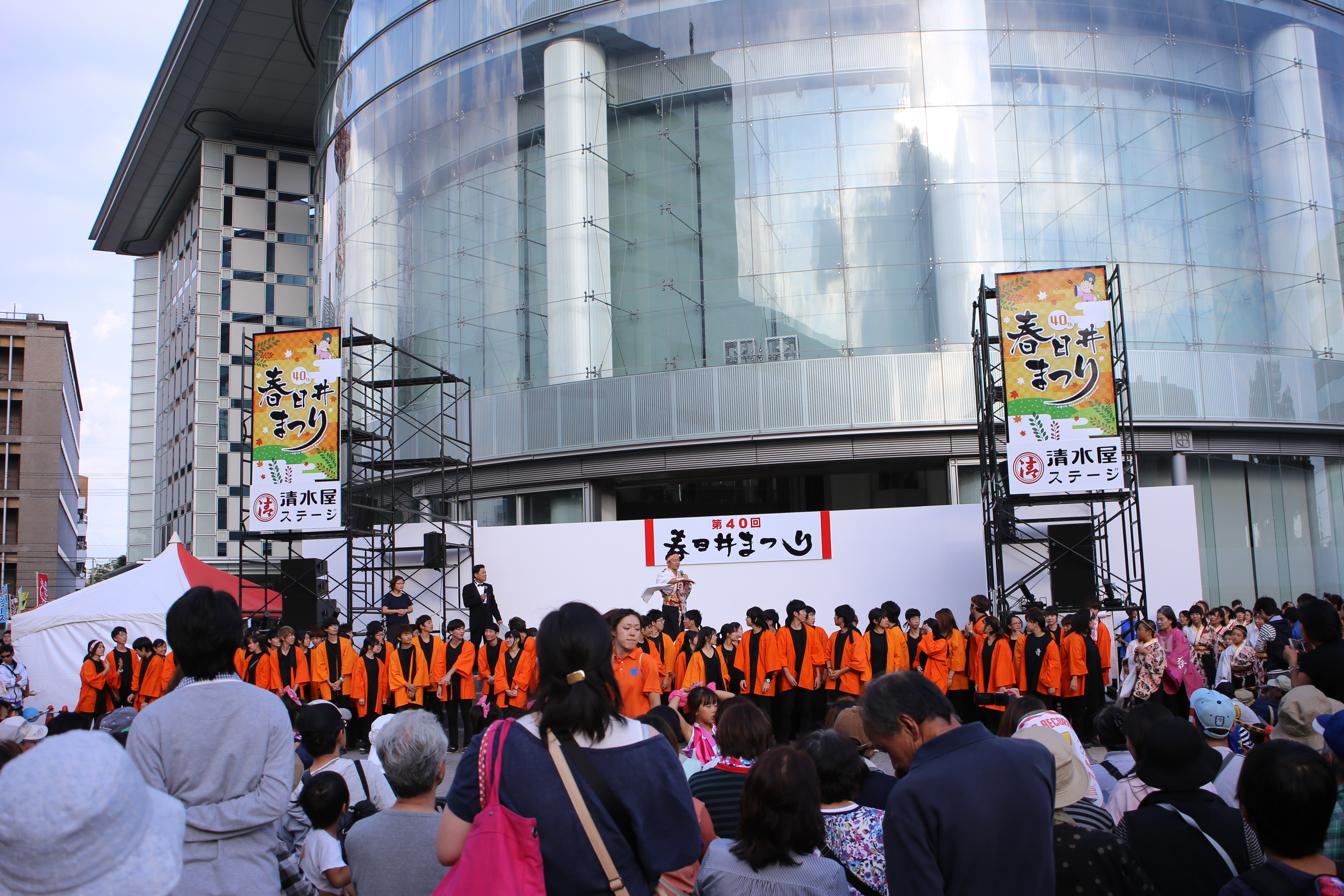 愛知県春日井市で行われた春日井まつりの様子